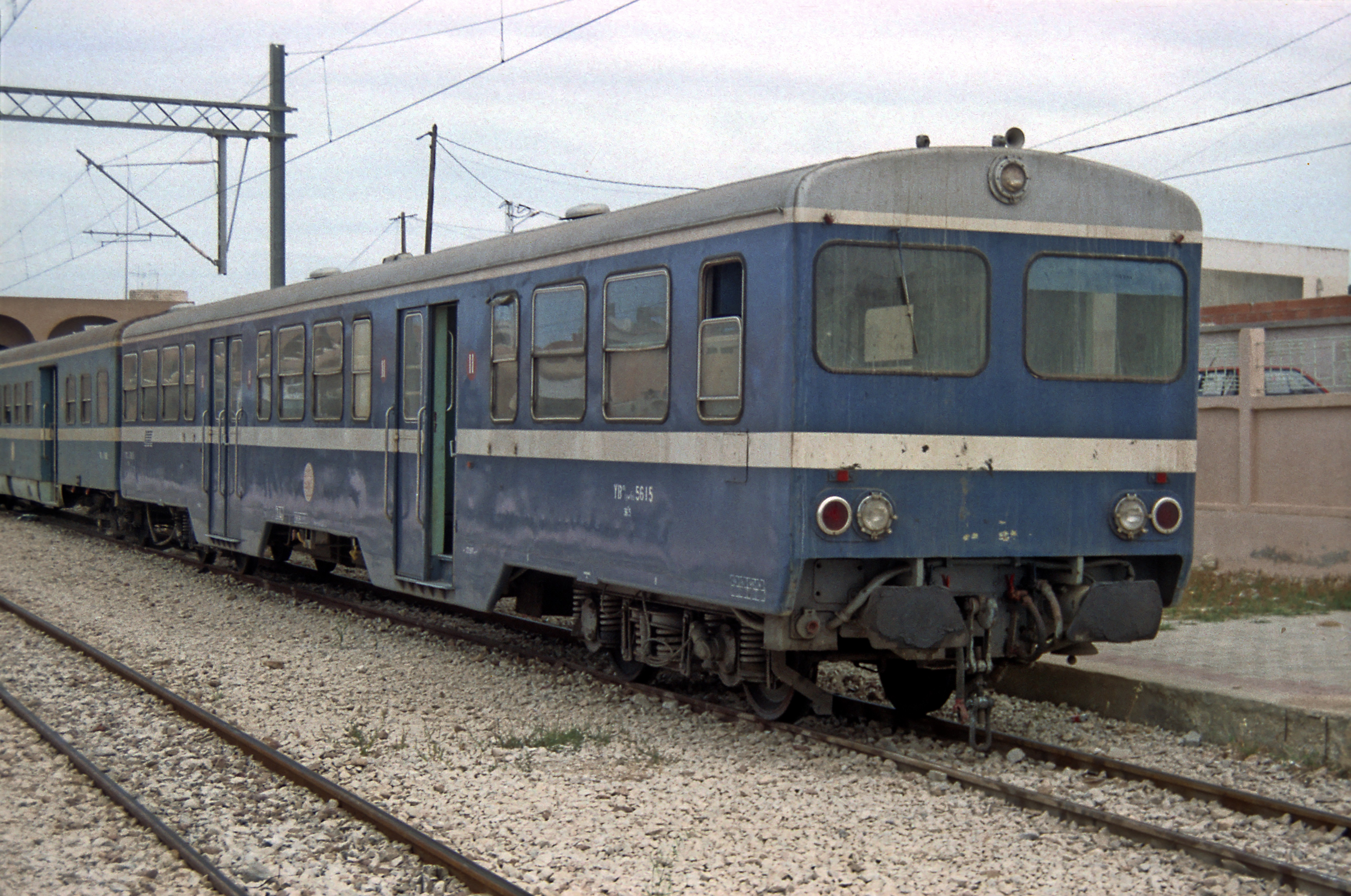 Umspurbarer Steuerwagen auf Meterspur